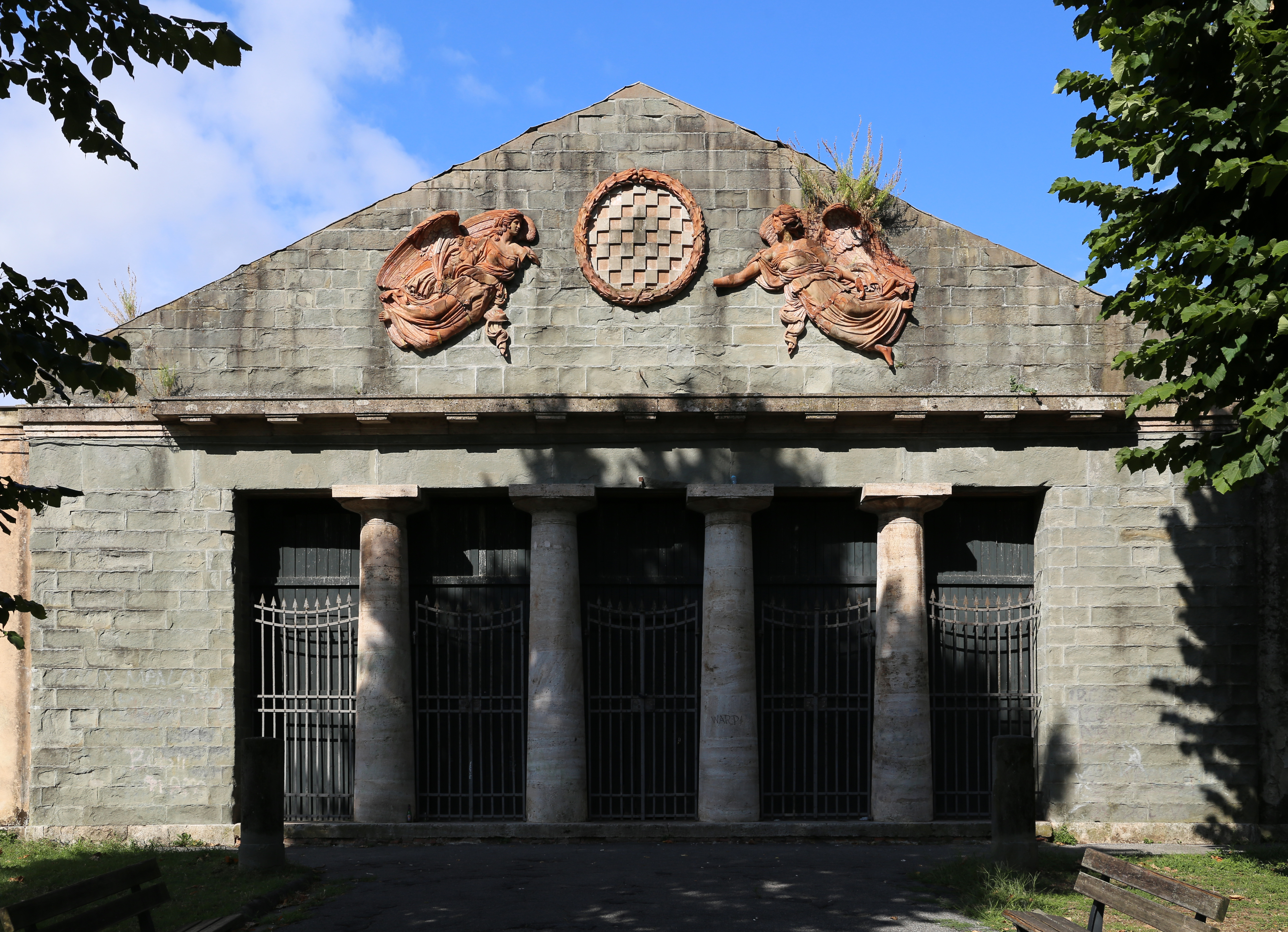 Pantheon degli uomini illustri This is a photo of a monument which is part of cultural heritage of Italy.